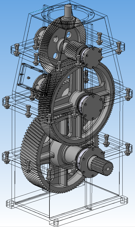 Твердотелая модель конического-цилиндрического редуктора (с 1-й конической передачей), выполненная в среде "Компас"